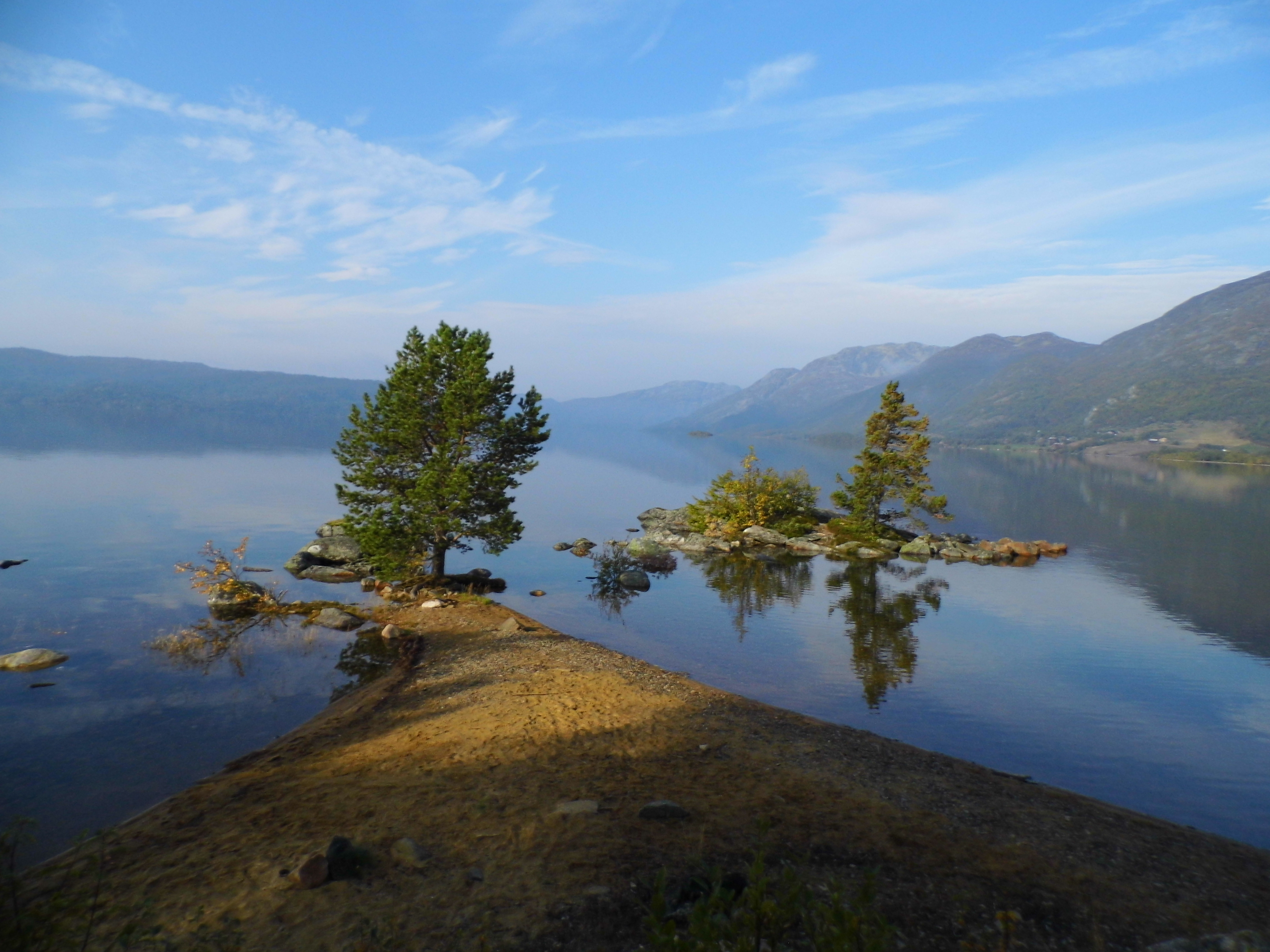 Utsikt over Sporaneset og innsjøen Totak. P.g.a. høy vannstand er neset delevis oversvømmet.